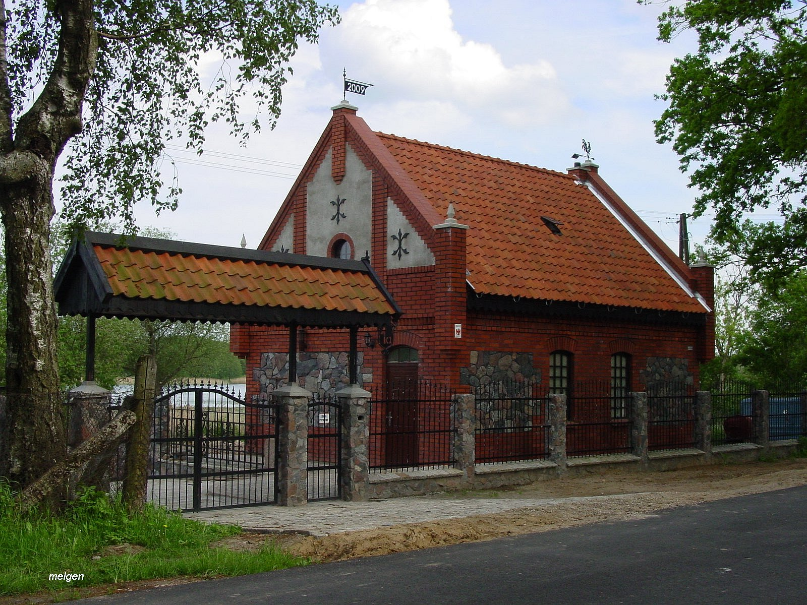 Zabytek rodu Lehndorffów (kuźnia rządcy w Pniewie)